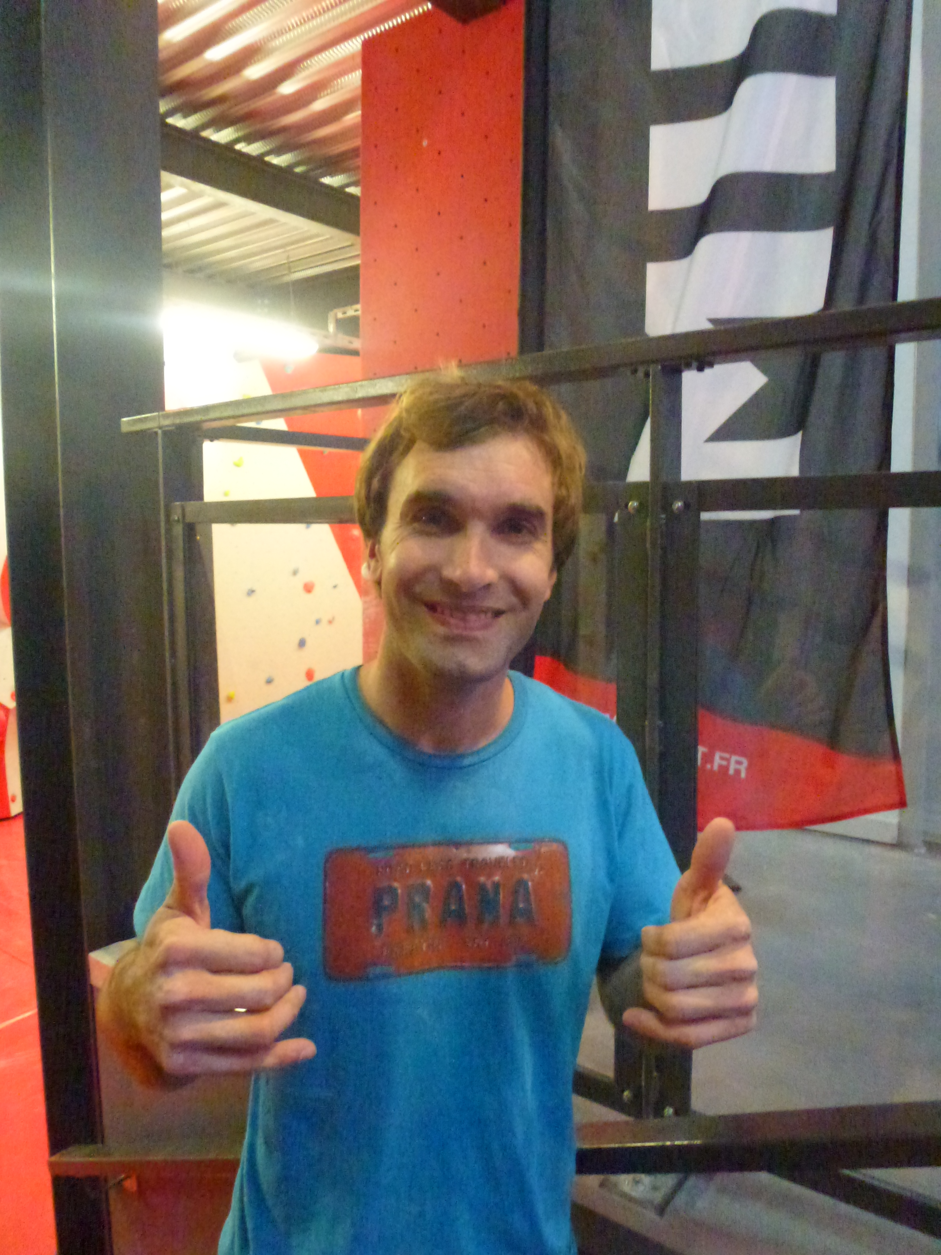 Chris Sharma, le 2 avril 2015 à Climb Up Aix